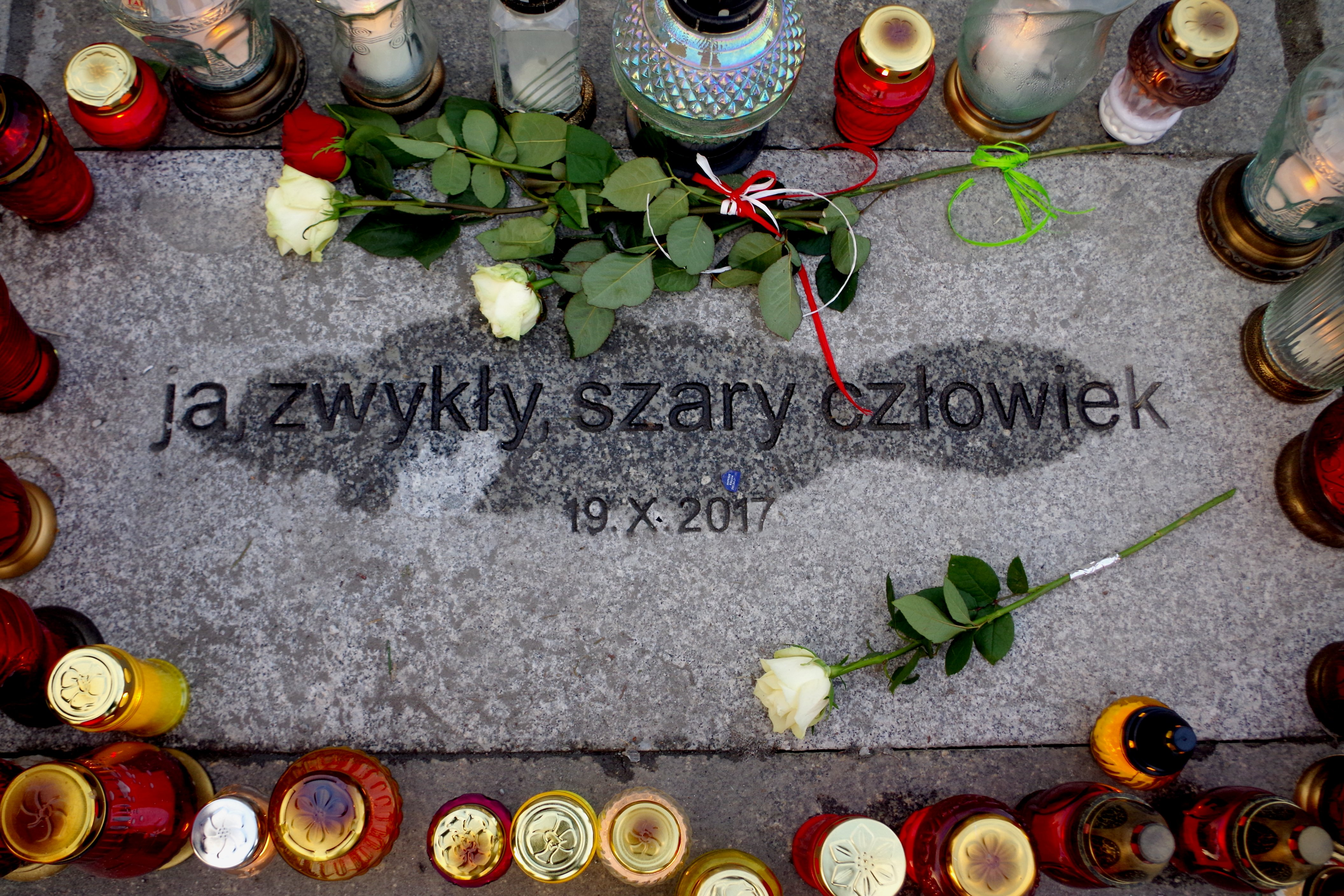 Tablica w miejscu w którym 19 października 2017 dokonał samospalenia Piotr Szczęsny